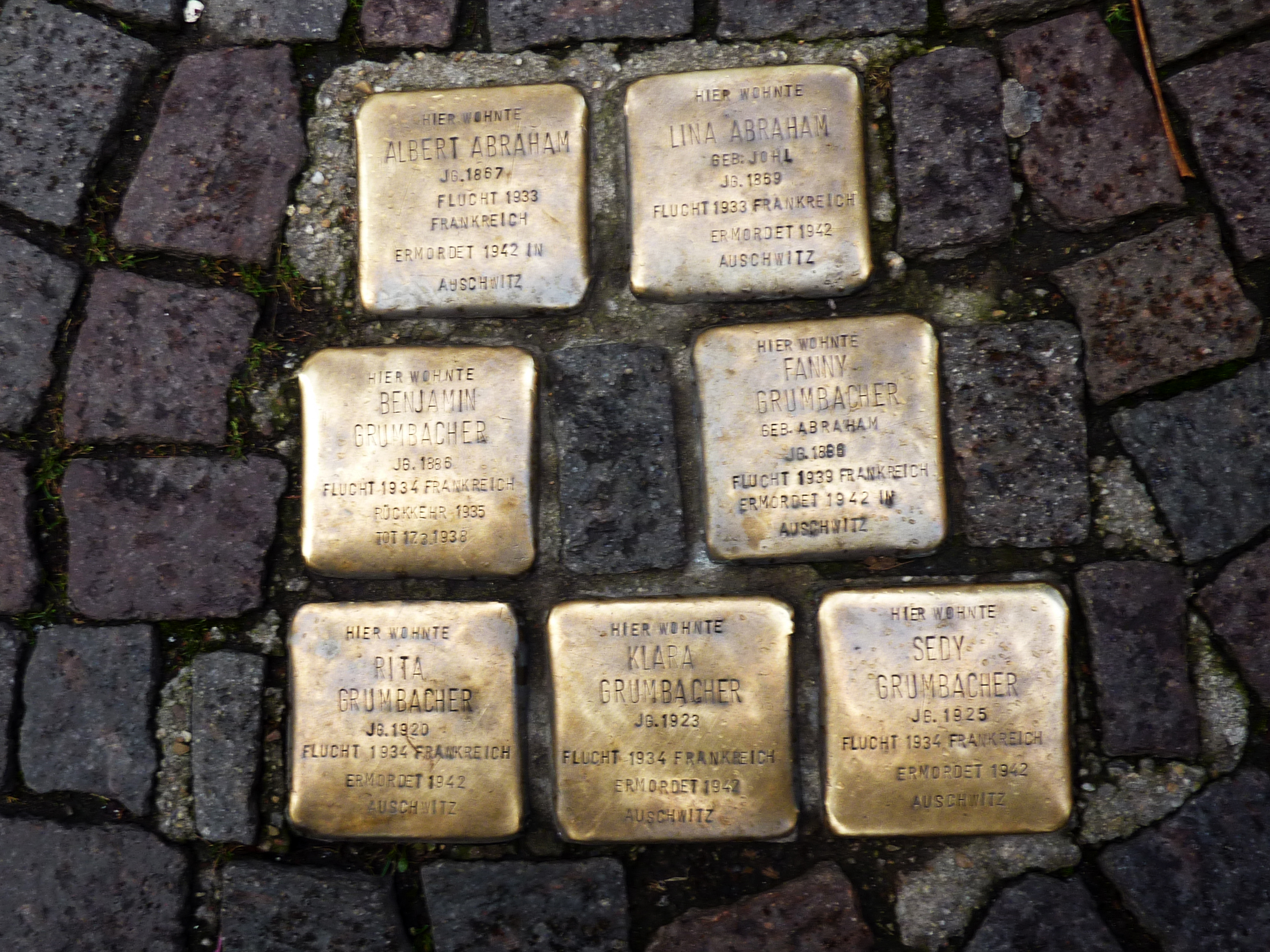 Stolpersteine für Albert und Lina Abraham sowie Benjamin, Fanny, Rita, Klara und Sedy Grumbacher vor dem Haus Eisenbahnstraße 66, Freiburg im Breisgau.